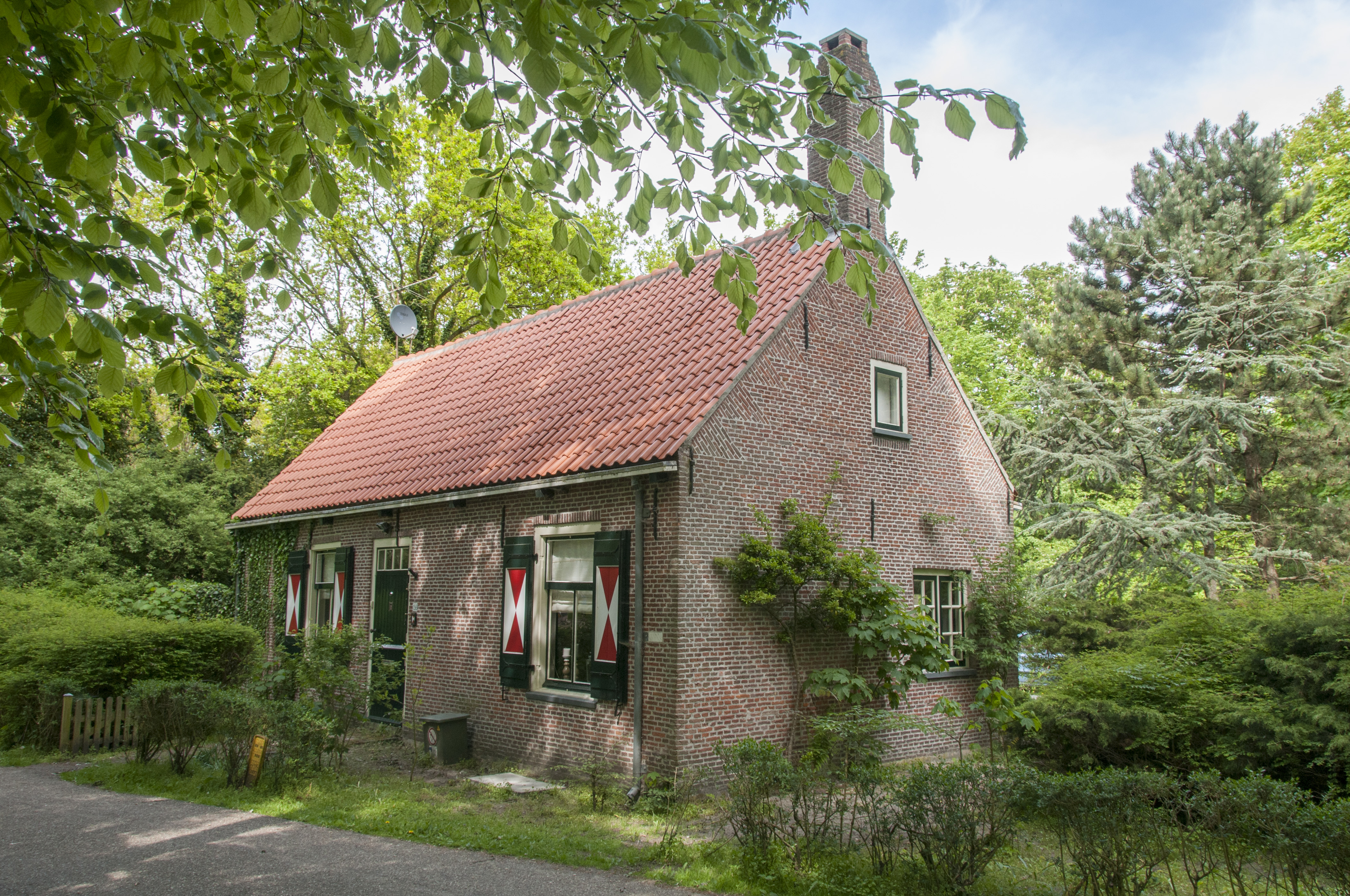 Stenen huisje in het 'Panbos' in de buurt van Katwijk.